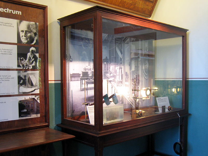 Historisches Exponat aus dem physikalischen Experimentiersaal der Urania in Berlin. Steht heute im Spectrum (Science Center Berlin).